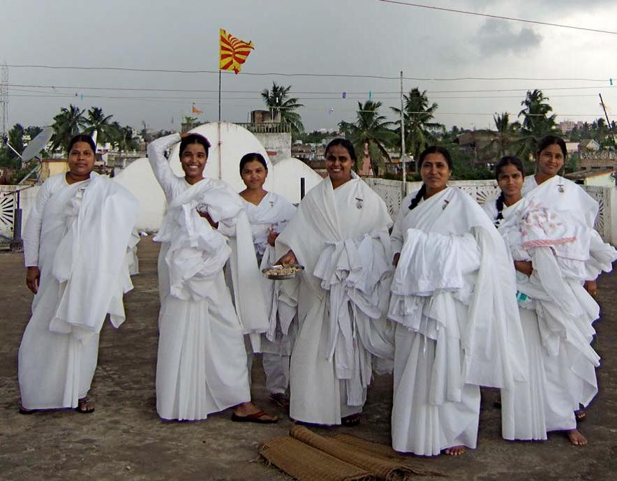 Indische Schwestern auf dem Dach des Centers in Orissa.